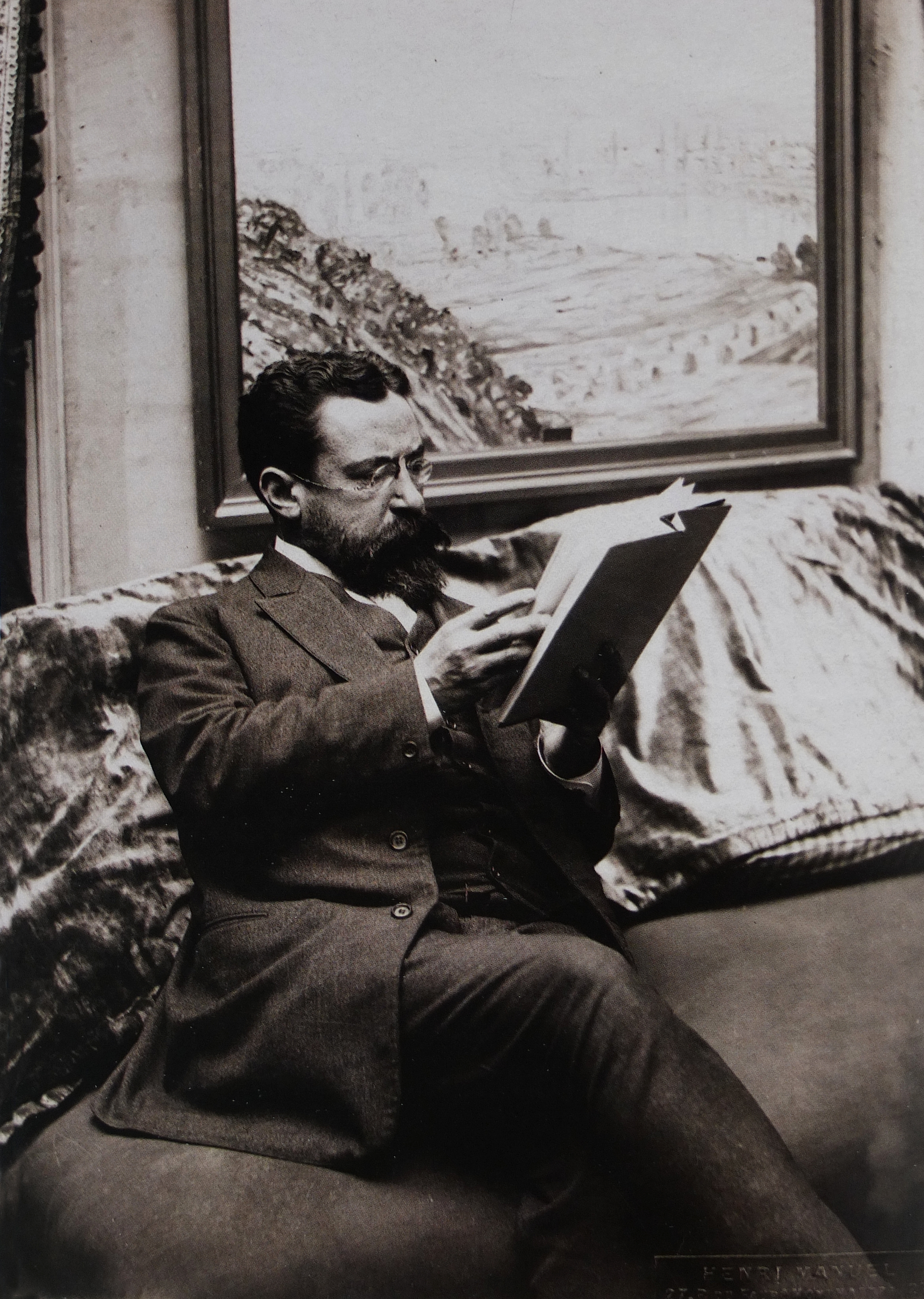 Marcel Sembat lisant devant un tableau de Georgette Agutte, photographie de Henri Manuel, vers 1920. Archives Agutte-Sembat